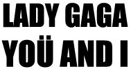 Texto de la portada del single "Yoü and I", de Lady Gaga.